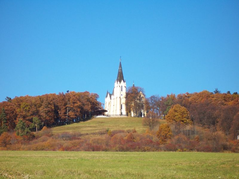 Bazilika Navštívenia Panny Márie na Mariánskej hore